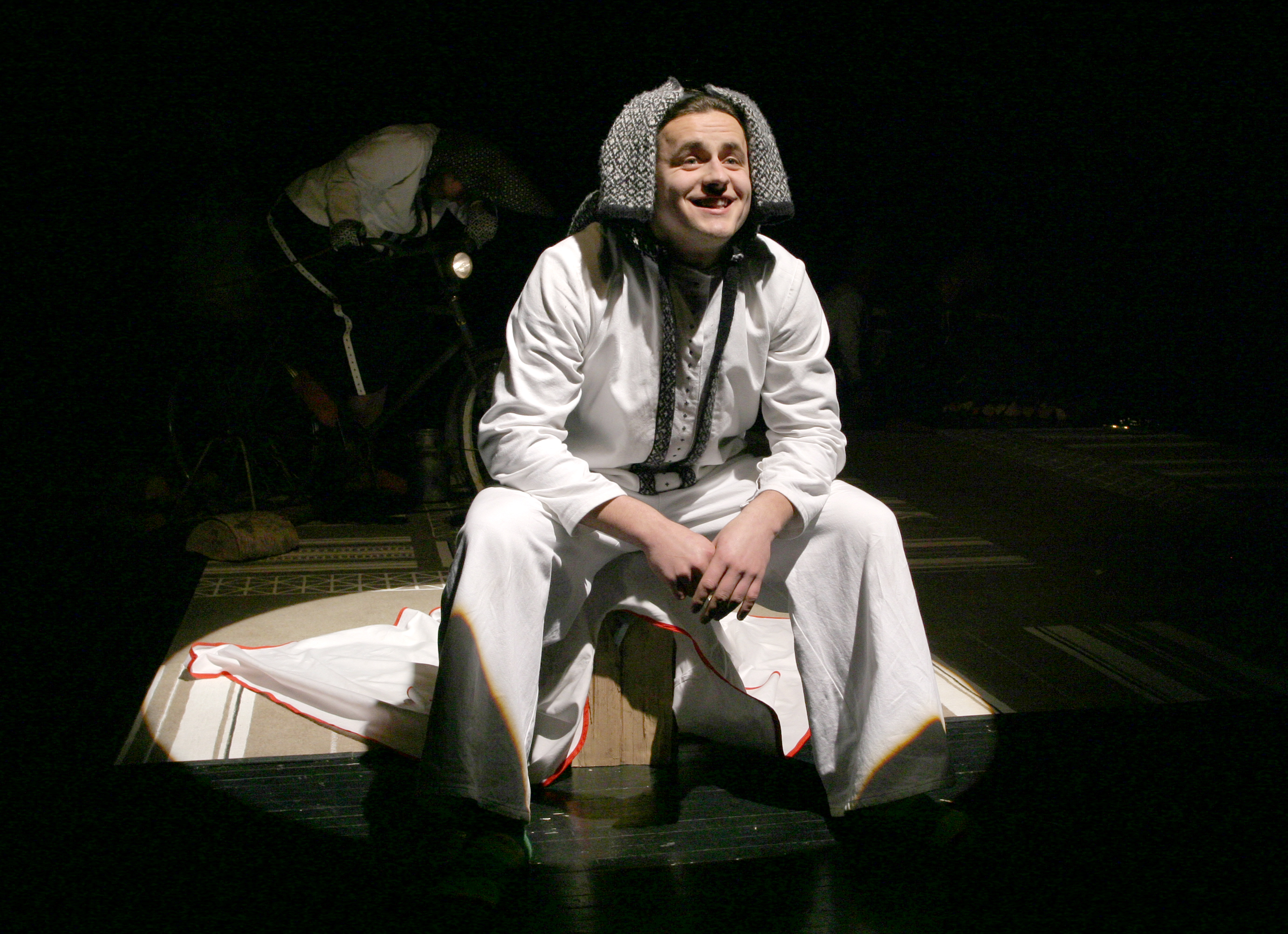 Tarmo Tagamets "Võrumaa rituaalid" (2007). Lavastaja Tarmo Tagamets, kunstnik Tuuli Tubin. Fotol Agu Trolla.